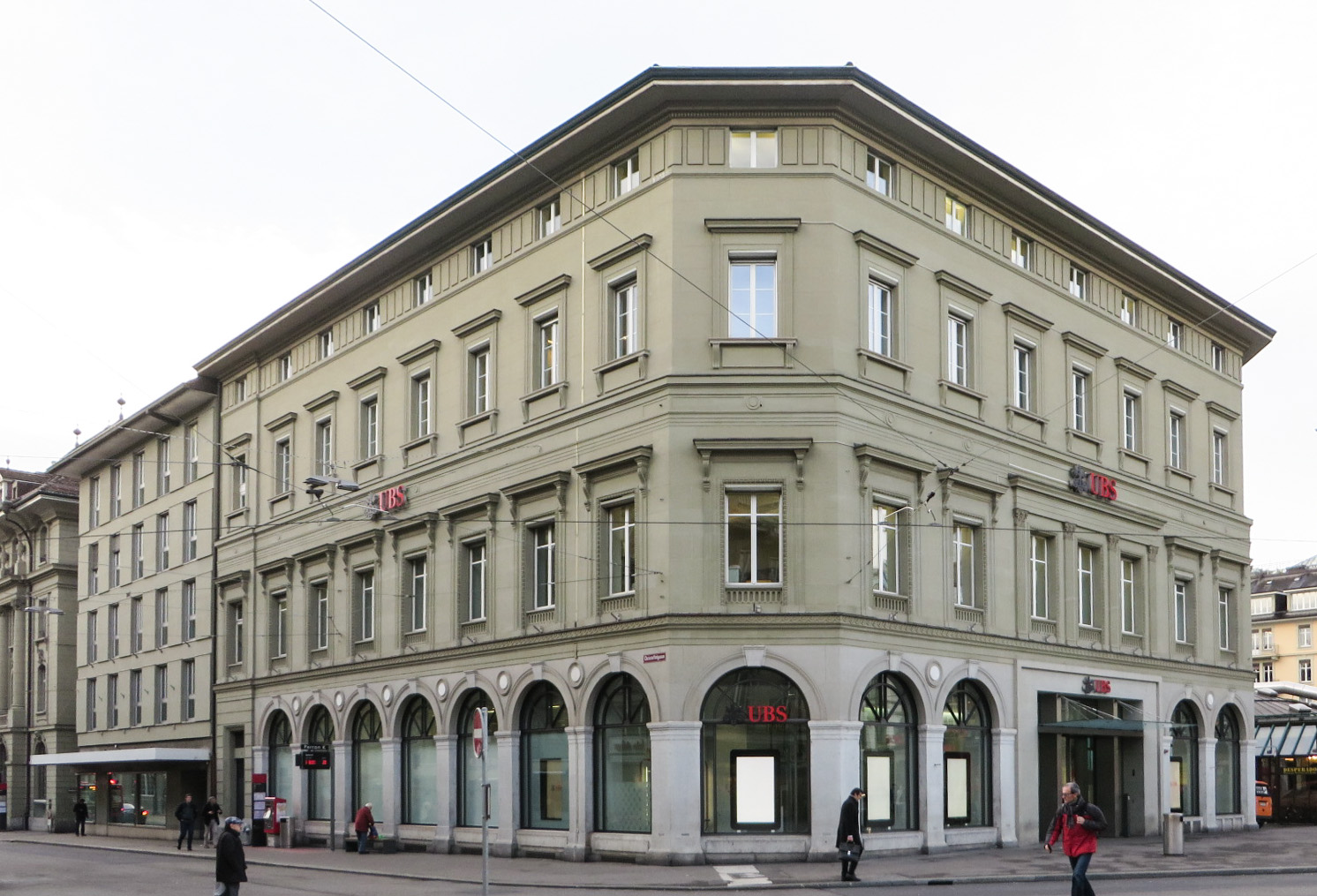 Ursprünglicher Hauptsitz der Eidgenössichen Bank in Bern, Schweiz, heute UBS AG